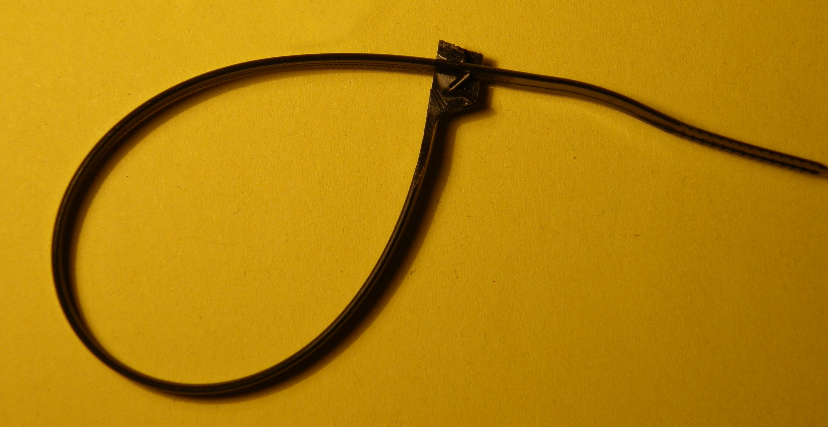 Kabelbinder mit Metallzunge aufgeschnitten